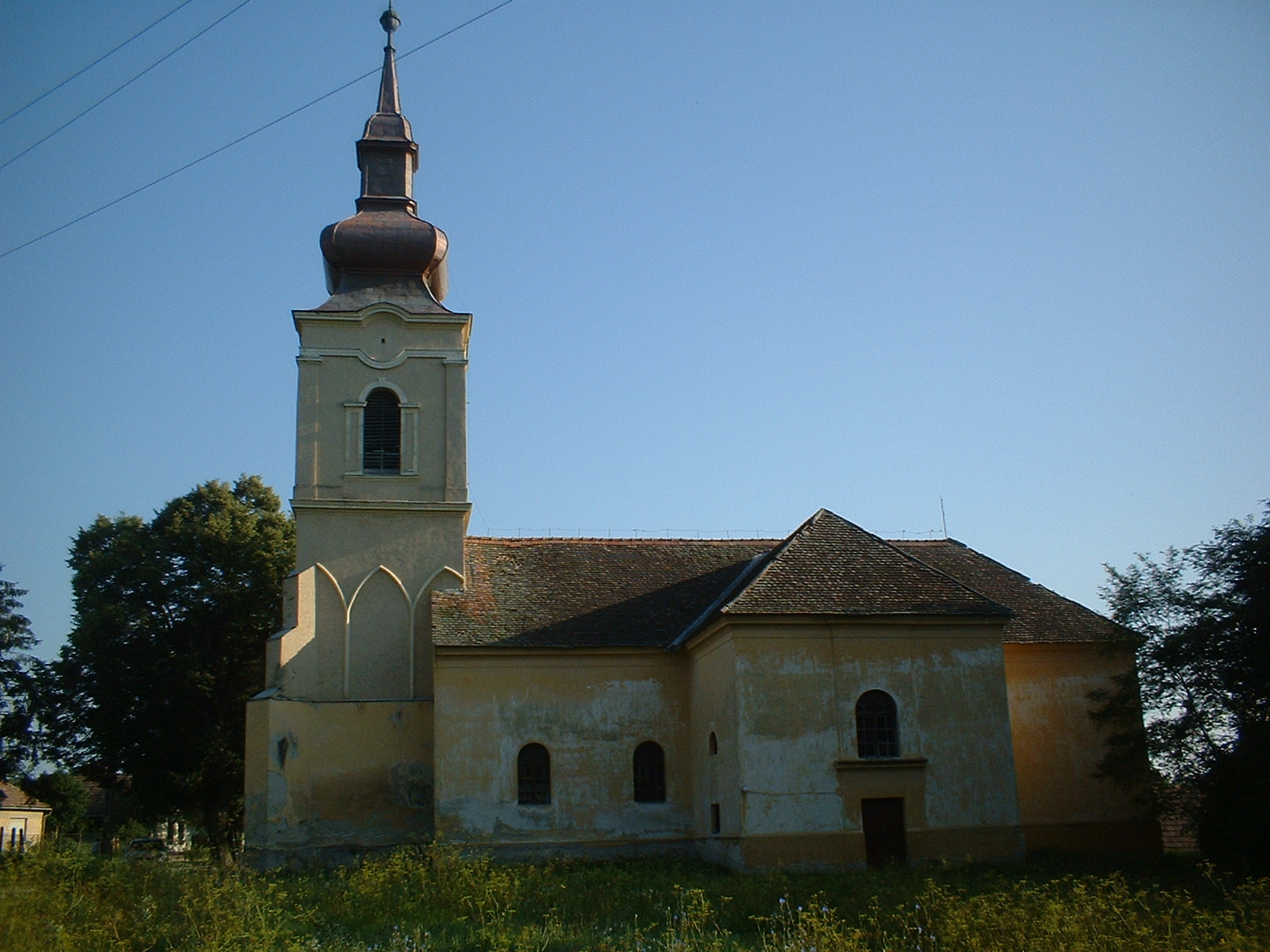 Református templom (Nagycsepely, Petőfi utca 42.) This is a photo of a monument in Hungary. Identifier: 8030